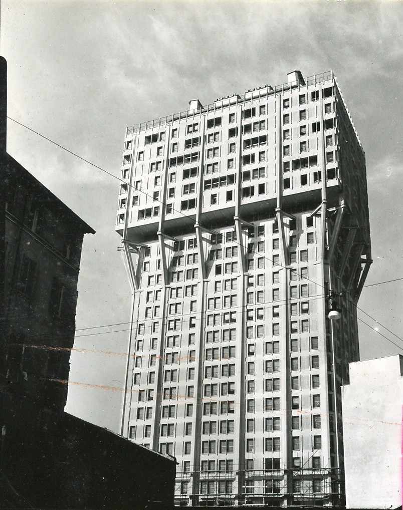 Servizio fotografico : Milano, 1960 / Paolo Monti. - Fototipi: 2 : Positivo b/n, gelatina bromuro d'argento/ carta, provino a contatto da pellicola 10x12. - ((La suddetta serie è contenuta nella scatola identificata con la numerazione 142; sul coperchio iscrizione manoscritta a pennarello: "Contatti 7a"